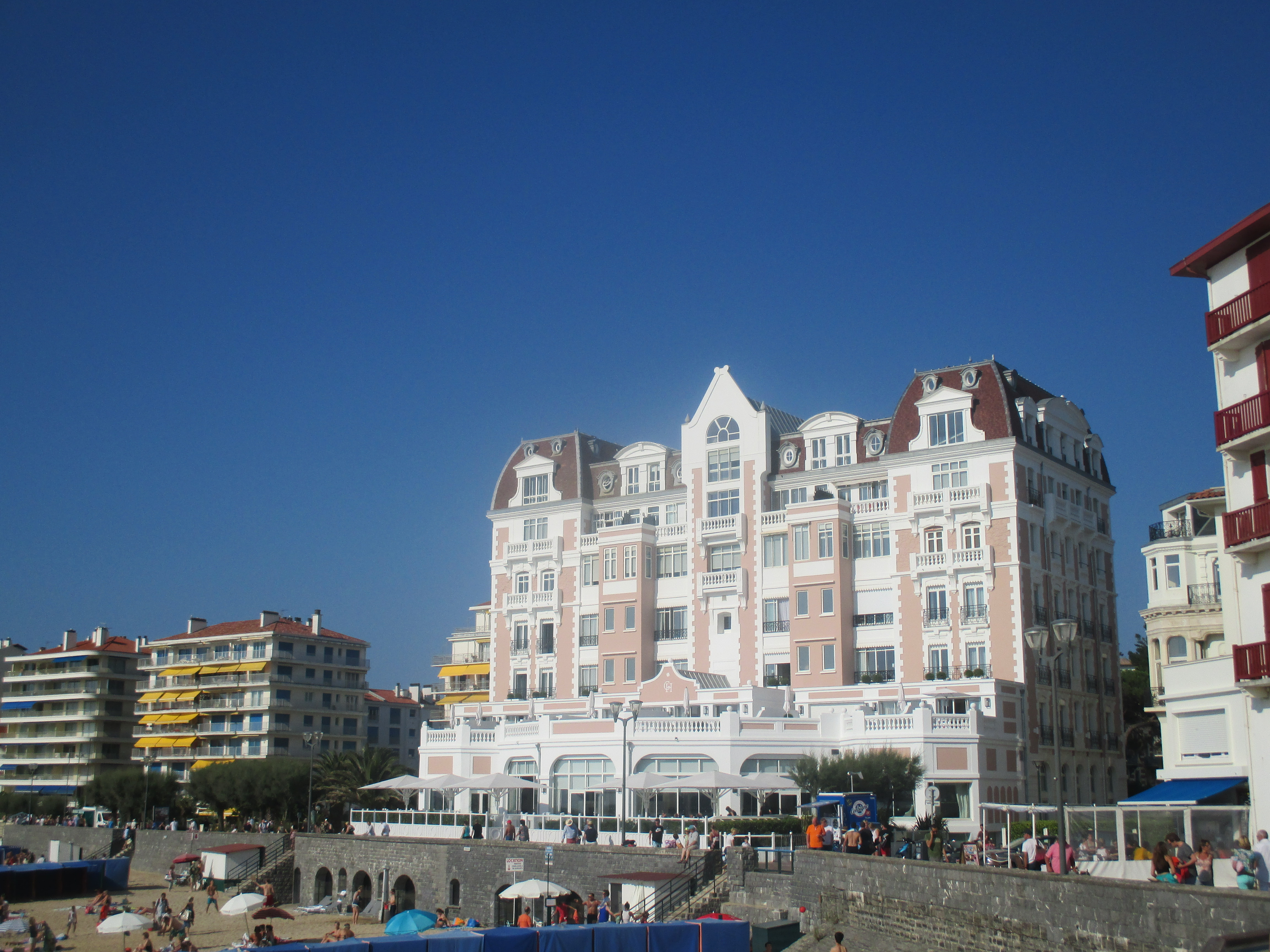 Grand Hôtel de Saint-Jean-de-Luz